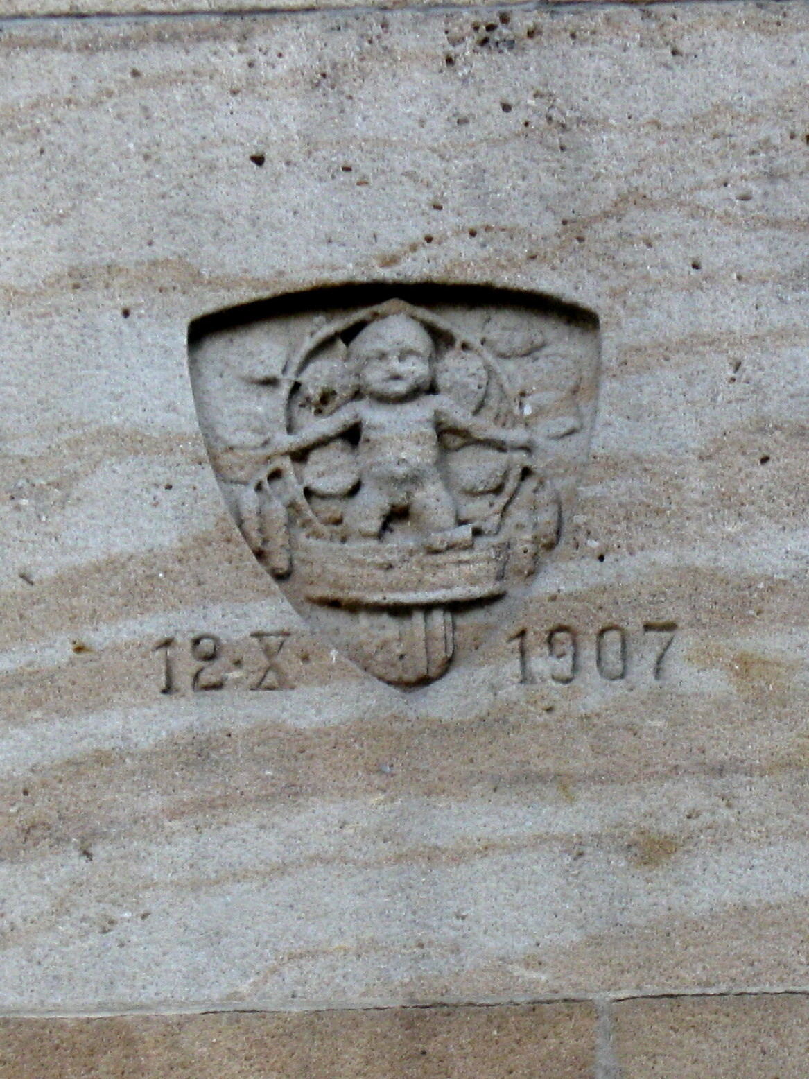 Maskottchen von Hans Erlwein am ehemaligen König-Georg-Gymnasium - dem heutigen Haus 28 des Universitätsklinikums Dresden - auf der Fiedlerstraße 25 rechts neben dem Eingangsportal